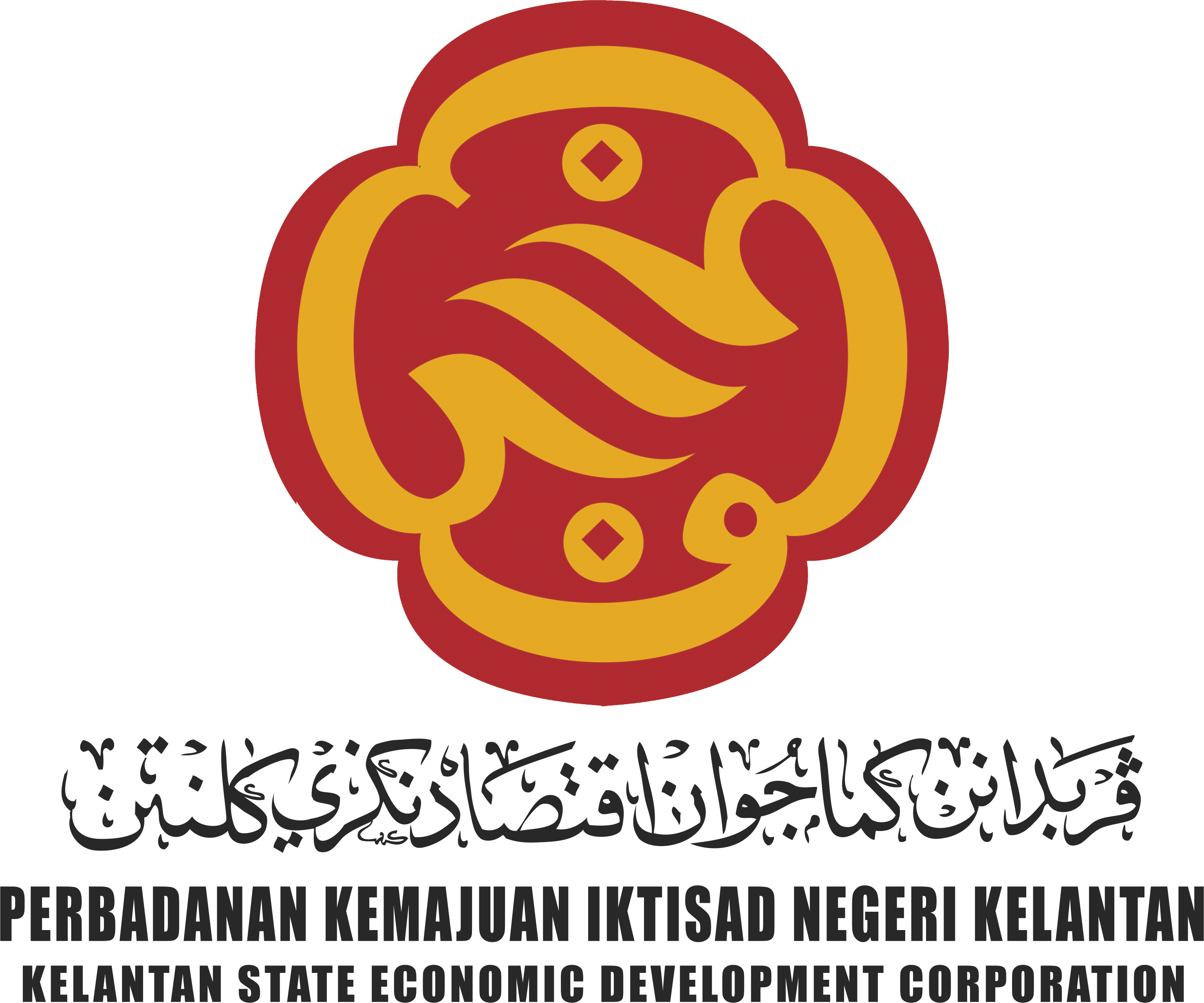 Logo PKINK Tulisan Jawi